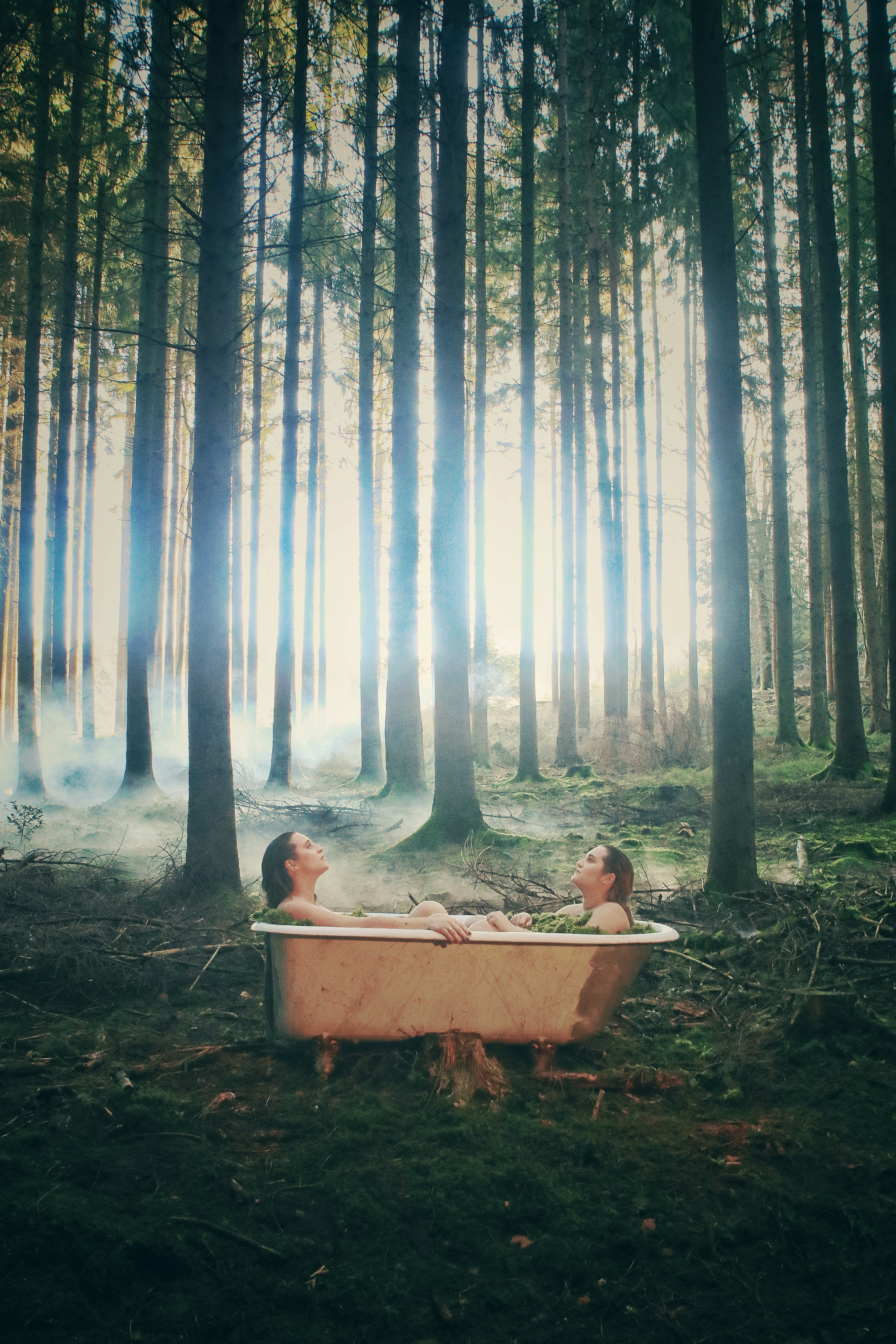 Annelies en Sarah Cappaert